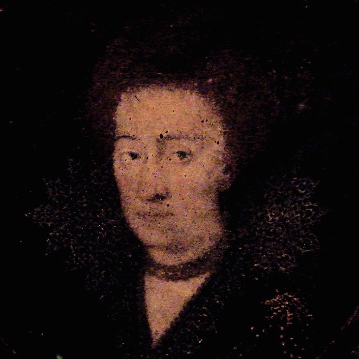 Hertuginde Elisabeth (1573-1626), prinsesse af Danmark og Norge (udsnit af hjerteminature), Frederiksborg Slot, Sjælland